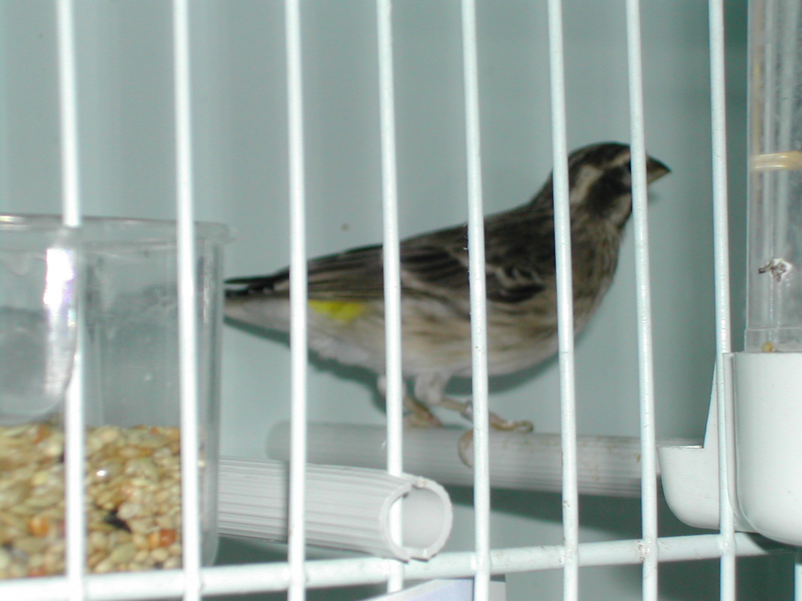 Serinus atrogularis